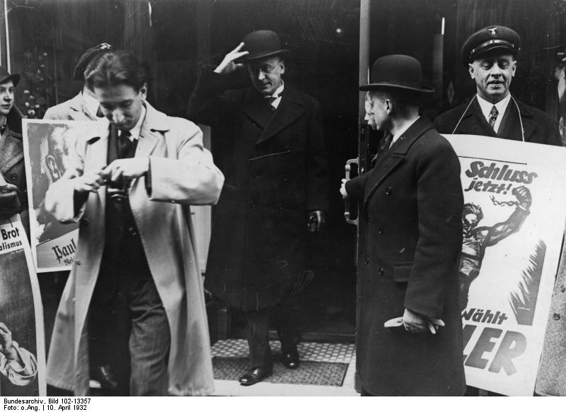 Der Schlussakt der Reichspräsidentenwahl am 10. April 1932! Reichskanzler Dr. Brüning wählt ! Reichskanzler Dr. Brüning verlässt nach der Abgabe seiner Stimme das Wahl-Lokal in der Kanonierstrasse in Berlin.